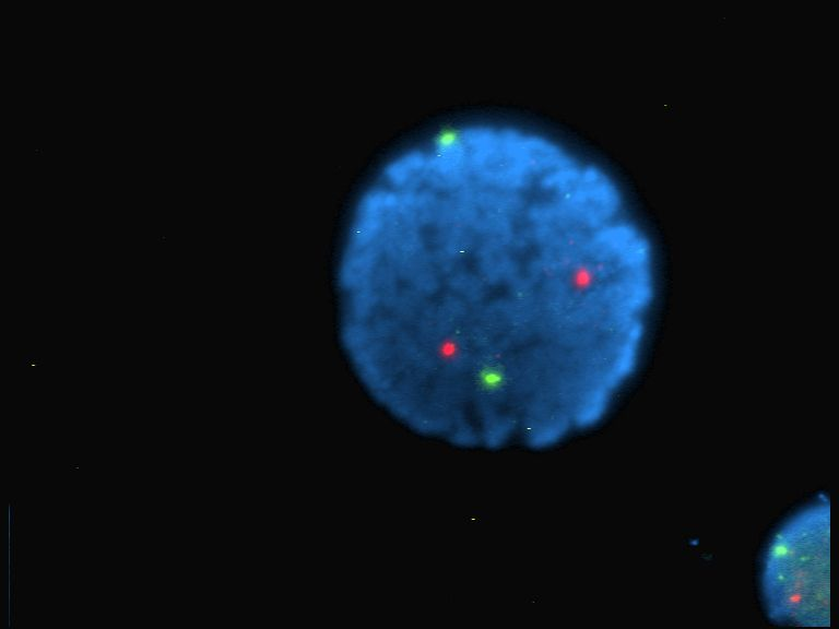 human lymphocyte nucleus stained with DAPI with chromosome 13 (green) and 21 (red) centromere probes hybrydized (fluorescent in situ hybridization, FISH) Obraz fluorescencyjny jądra ludzkiego limfocytu barwionego diaminofenyloindolem (DAPI) z sygnałami sond swoistych dla chromosomów 13 (zielony, sonda znakowana fluoresceiną) i 21 (czerwony, sonda znakowana rodaminą), uzyskany w wyniku zastosowania techniki FISH